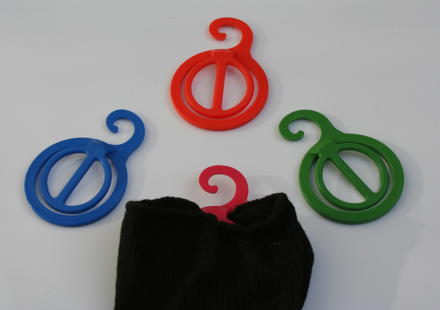 Sockenklammern